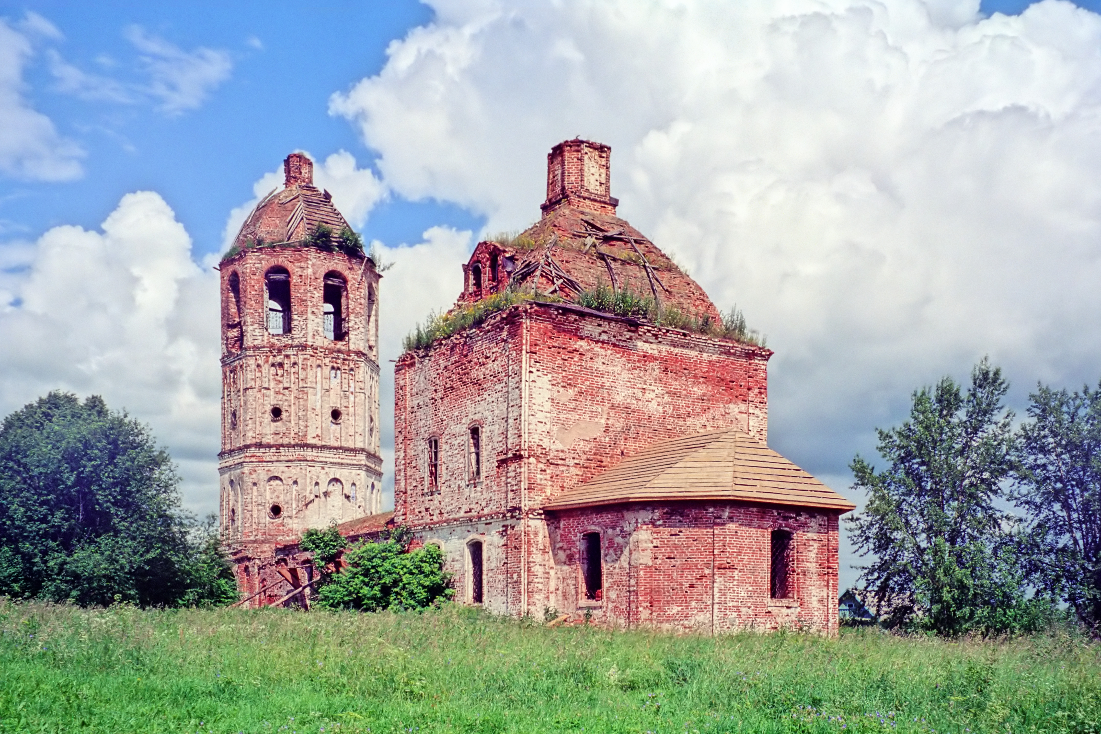 Церковь Покрова пресвятой Богородицы с приделами великомученика Александра Римского и Казанской иконы пресвятой Богородицы. Село Соломидино, Переславский район.